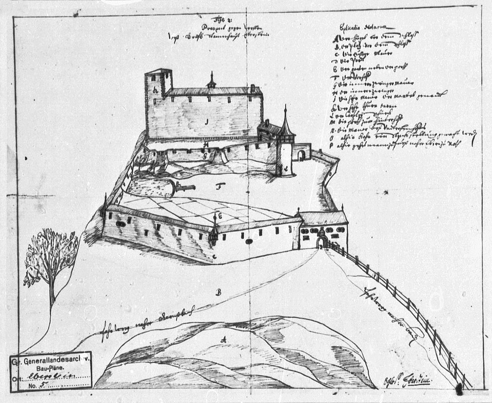 Schloss Eberstein bei Gernsbach, Ansicht von West, Zeichnung Bude 17. Jahrhundert (GLAK G Eberstein 5)